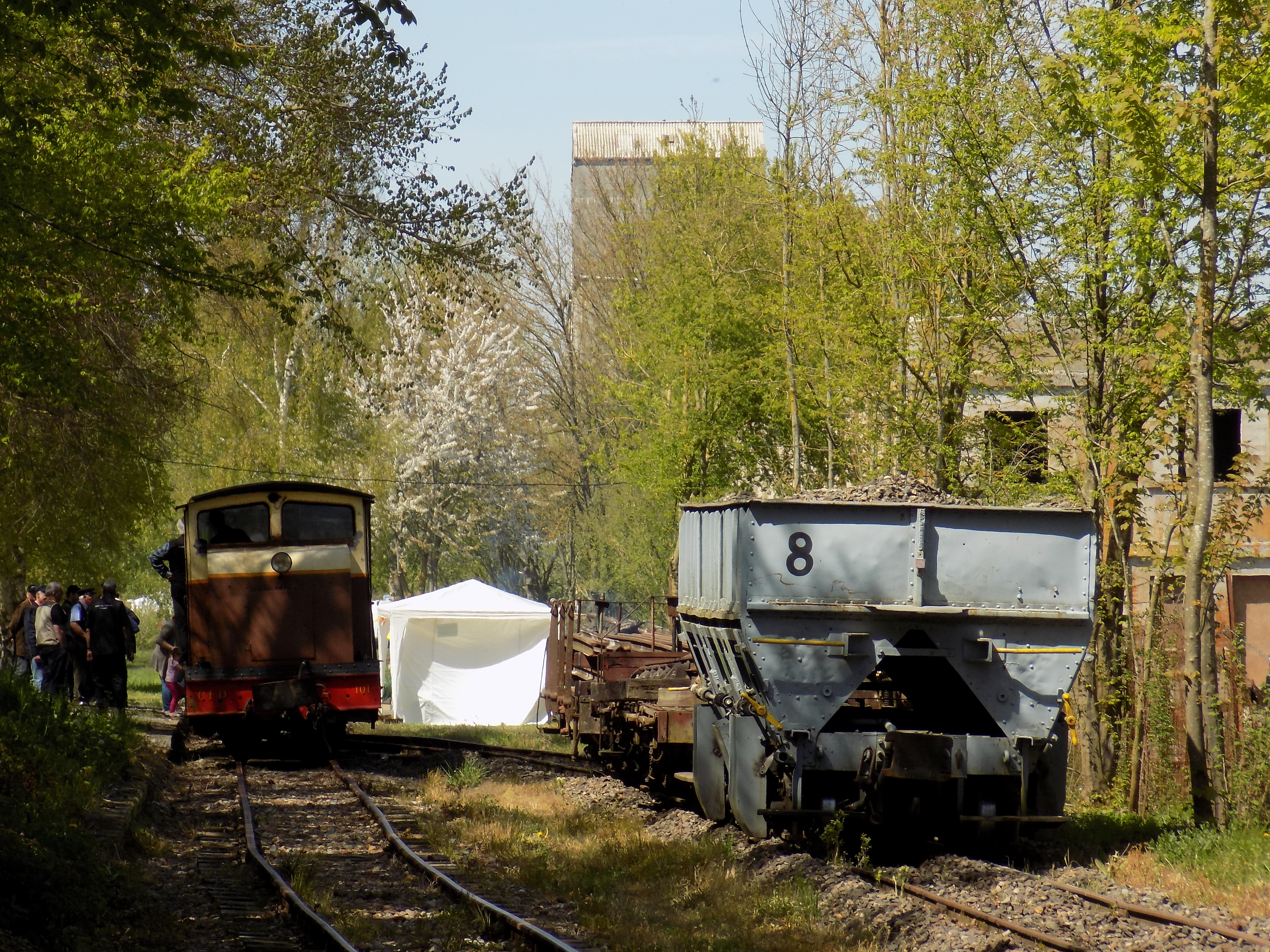 Locotracteur CFD MTVS + Trémie SGVA.